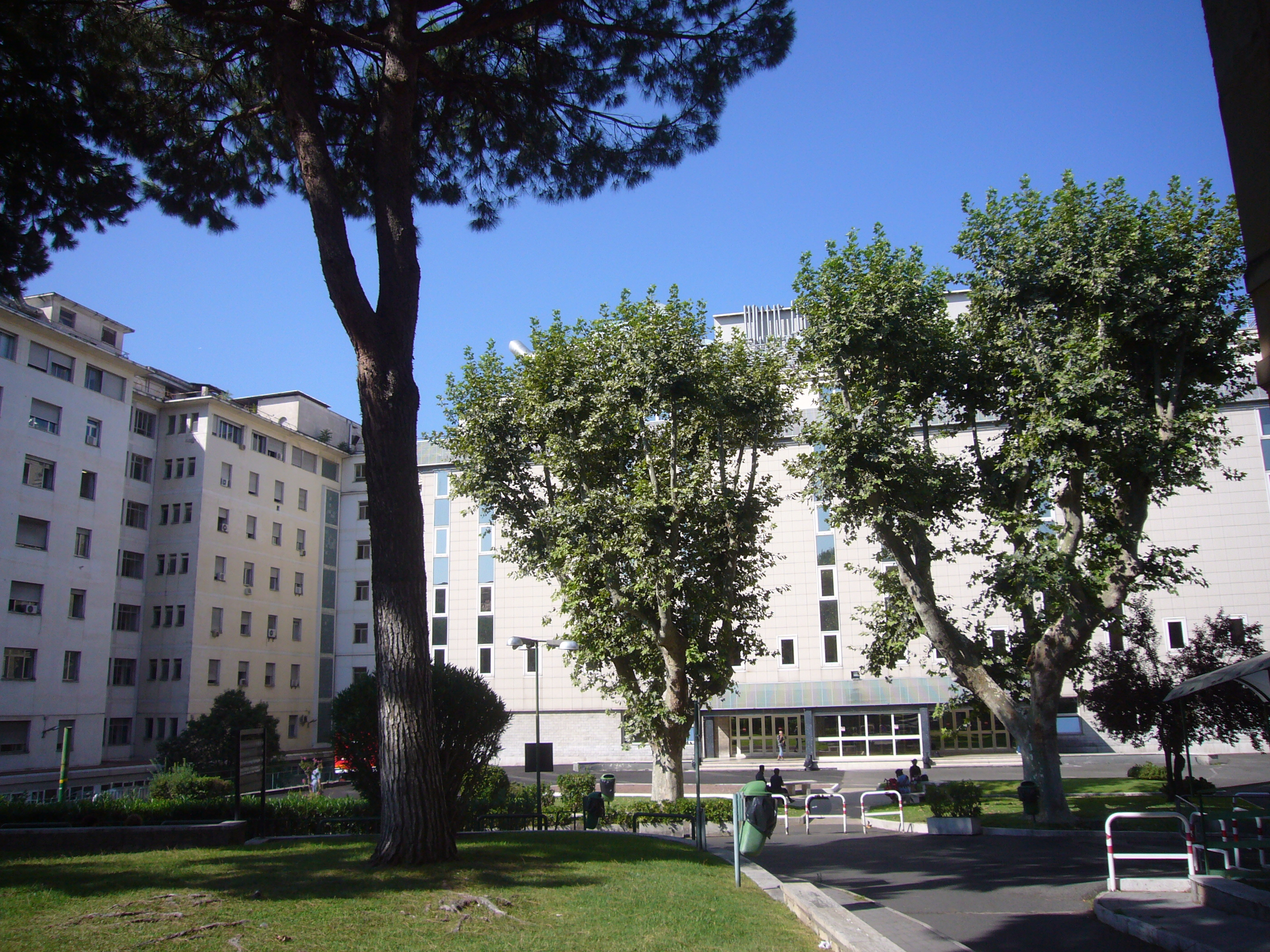 Roma, Ospedale s. Giovanni, reparti nuovi.